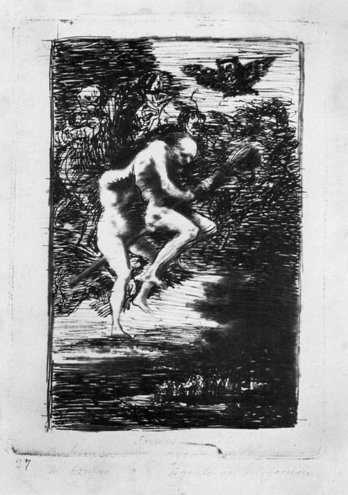 Dibujo preparatorio del capricho nª 68.